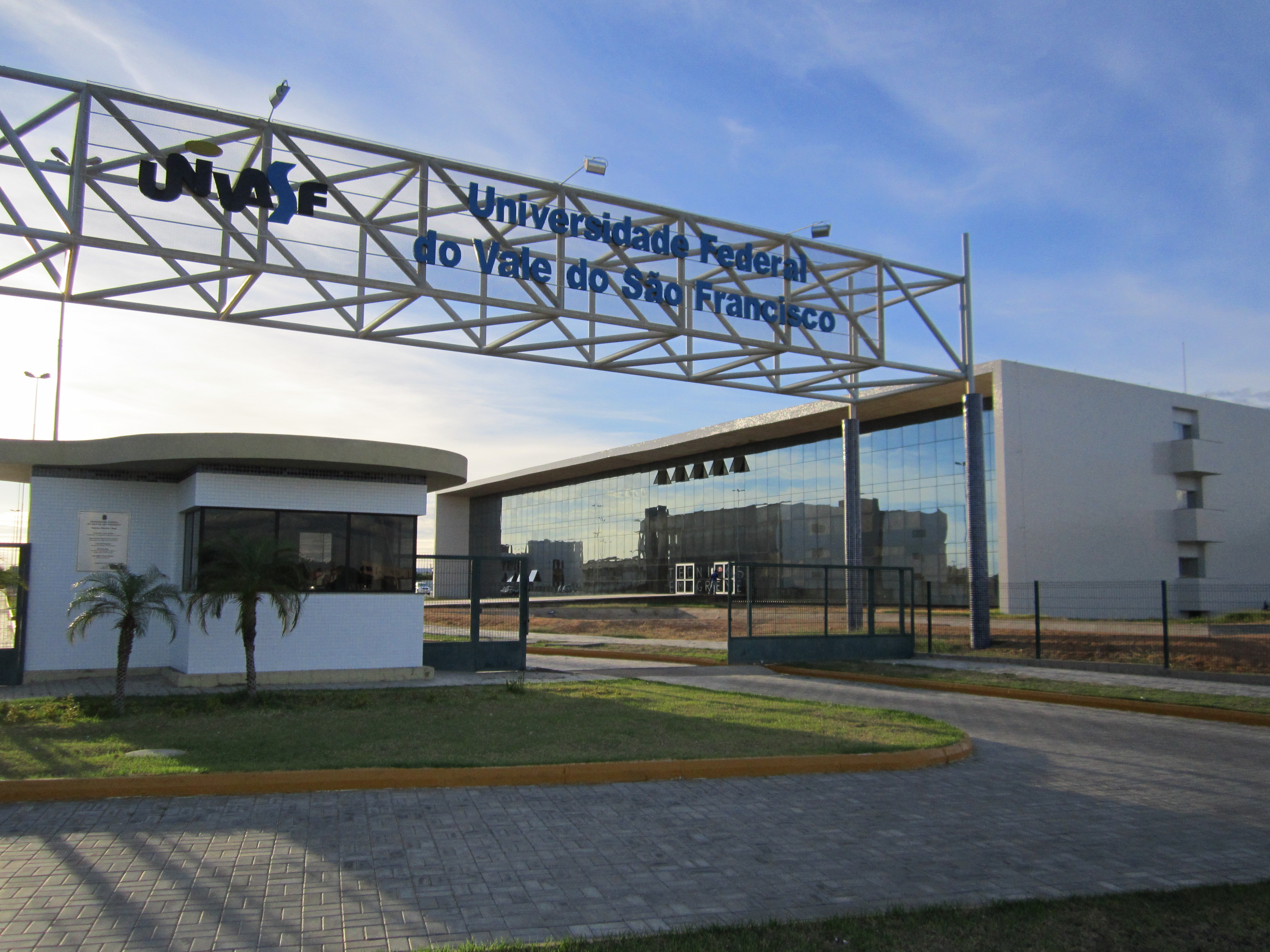 UNIVASF - Universidade Federal do Vale do São Francisco - Petrolina, Pernambuco, Brasil